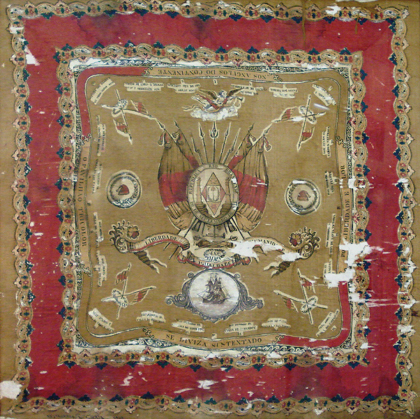 Lenço Farroupilha, Museu Júlio de Castilhos, Porto Alegre, Brasil.